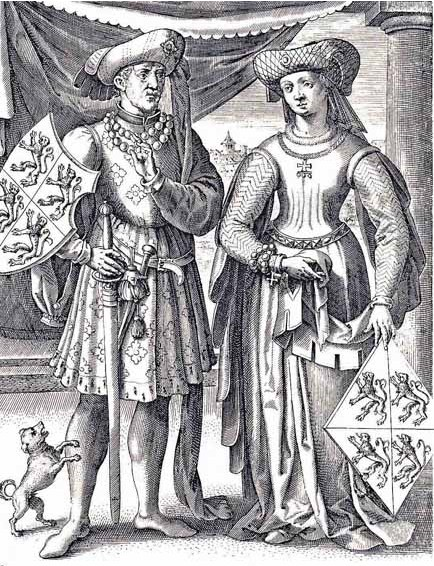 Václav Lucemburský a Johana Brabantská